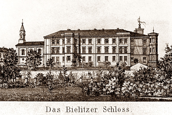 Zamek w Bielsku po przebudowie w latach 1850–1864, Carl Bollmann, litografia, ok. 1870 (za zgodą i ze zbiorów Muzeum Historycznego w Bielsku-Białej / With permission and from the collection of Historical Museum in Bielsko-Biała)